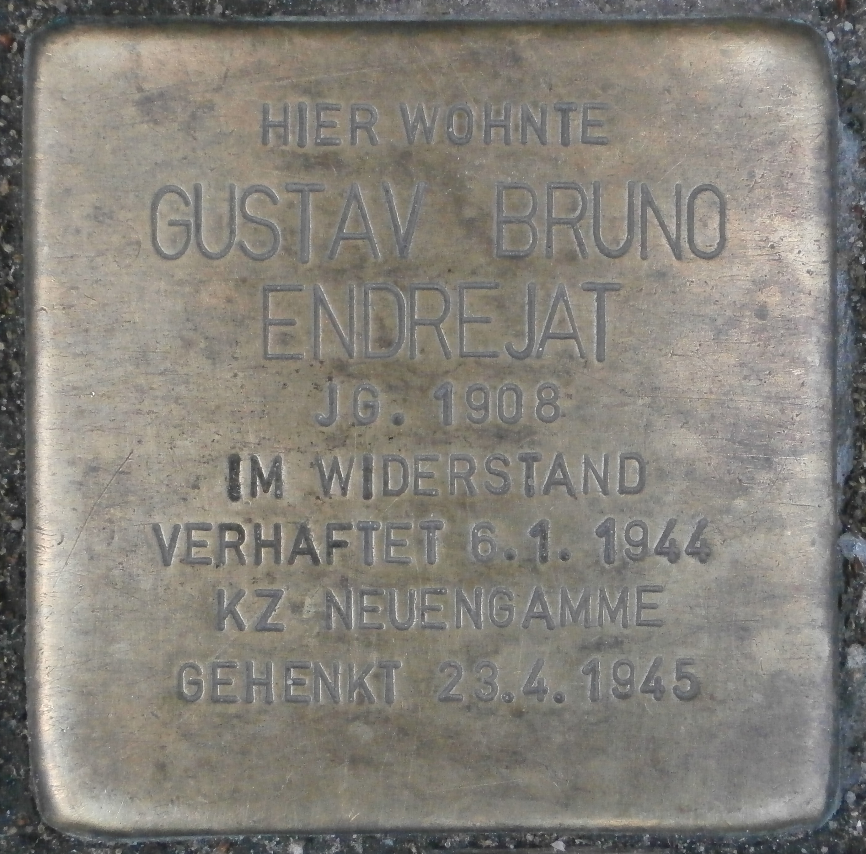 Stolperstein für Gustav Bruno Endrejat